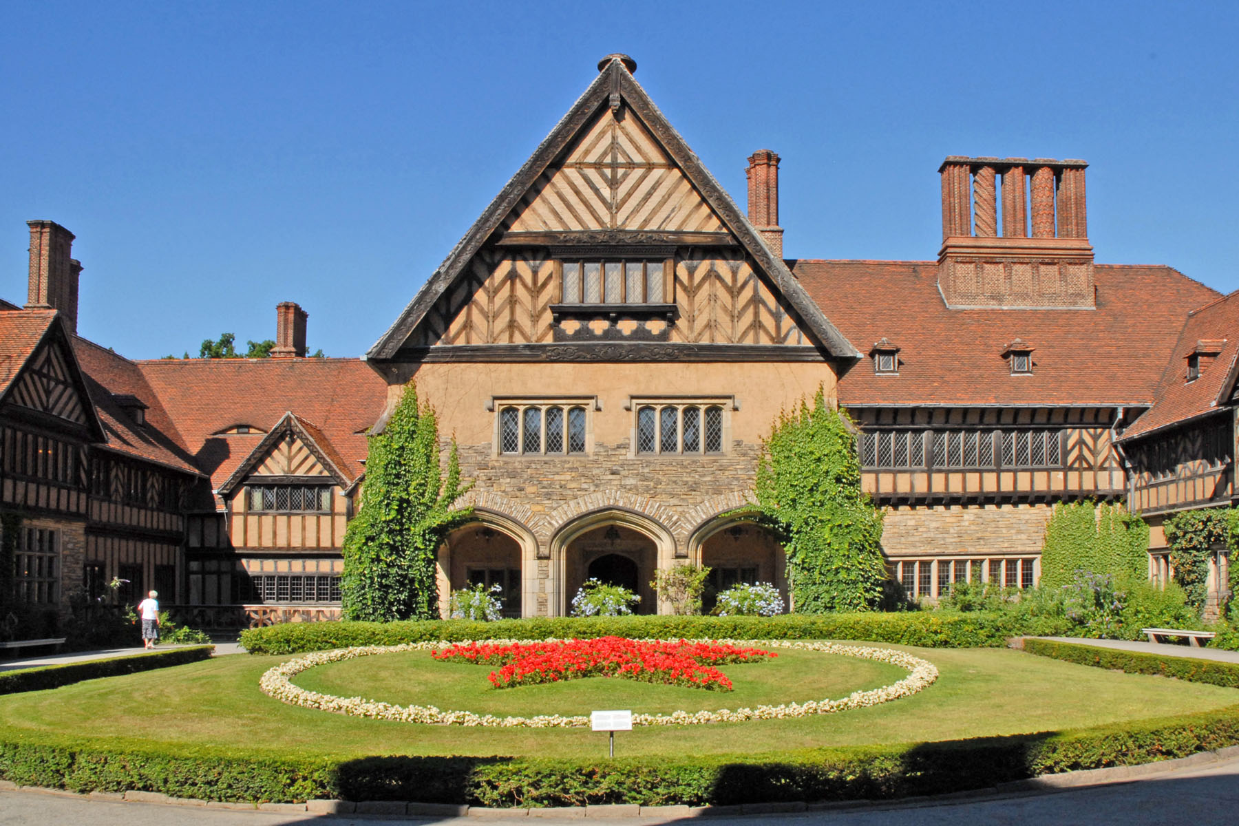 Le château Cecilienhof a été construit, à partir de 1914, pour le Prince héritier Guillaume et son épouse Cécile dans le style Tudor d'un cottage anglais. Du 17 juillet au 2 août 1945, dans ce château s'est tenue la conférence de Potsdam des puissances victorieuses du nazisme, en présence de Staline, Churchill, Truman et Eden. Une partie du Château est visitable (salle de la conférence et pièces annexes), l'autre partie est occupée par un hôtel de luxe. Après guerre, le château étant en zone soviétique, une étoile rouge en géraniums orne depuis lors le jardin.